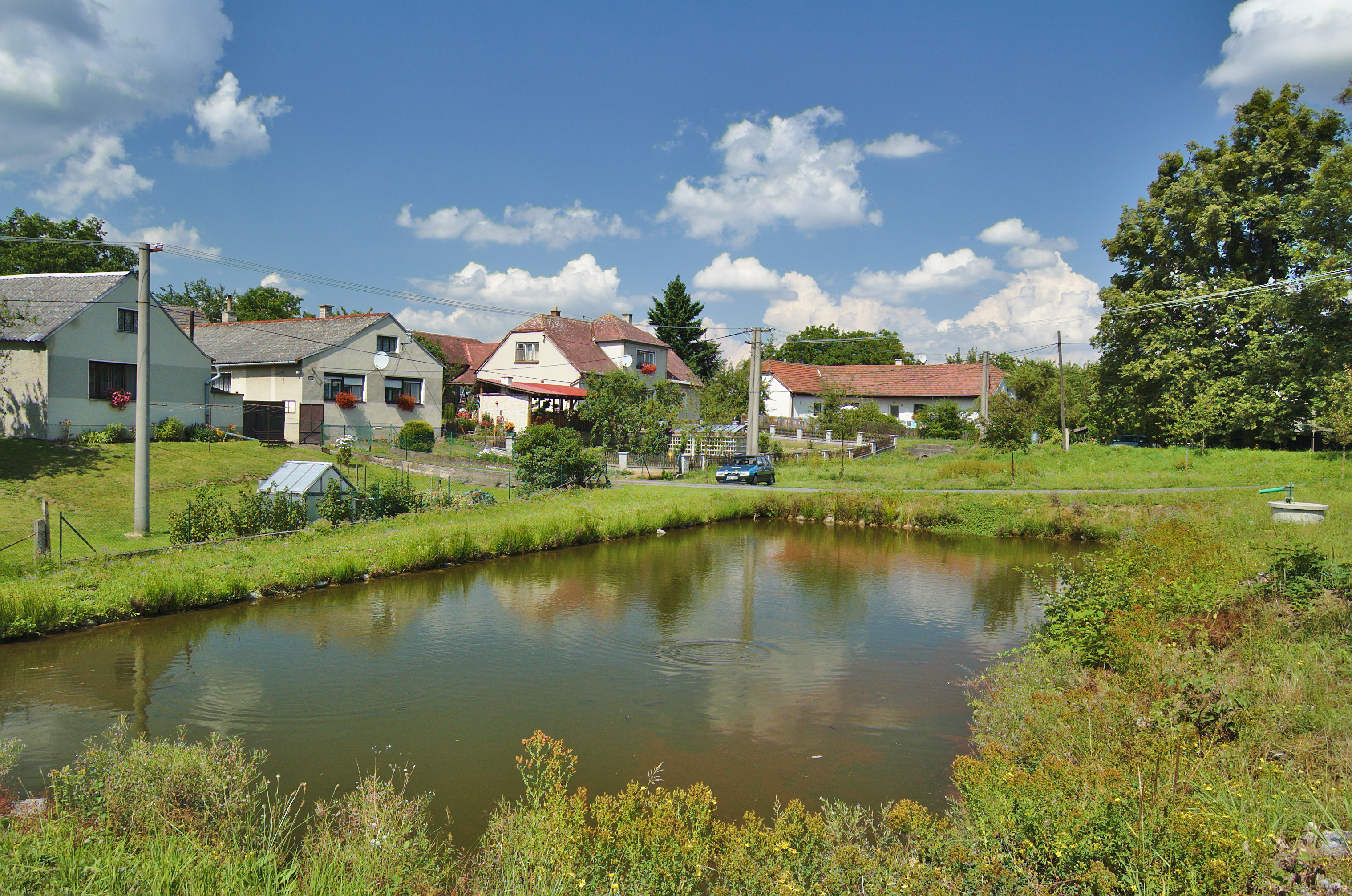 Rybník na návsi, Otročkov, Hvozd, okres Prostějov